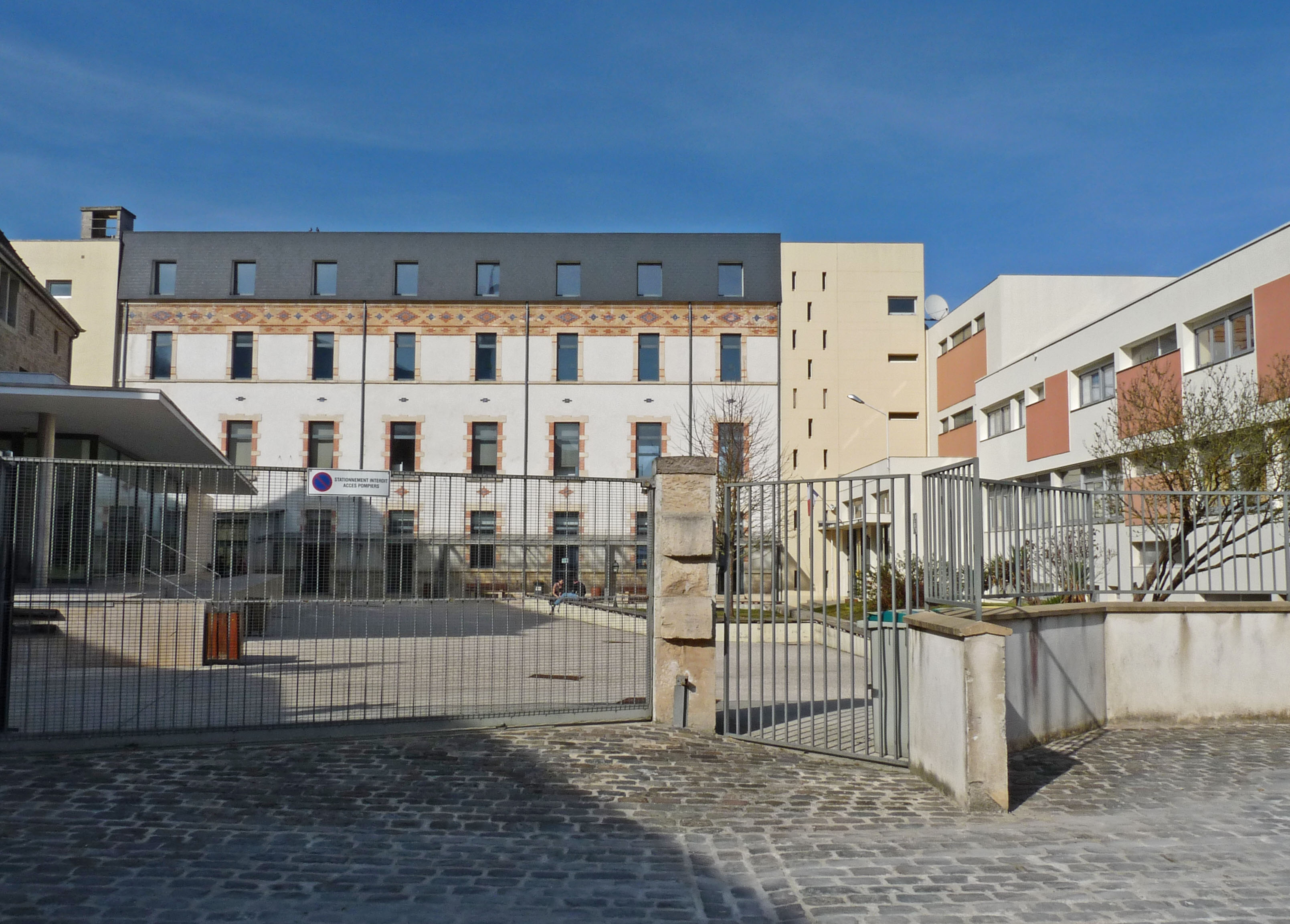 Lycée Philippe Lebon à Joinville (Haute-Marne)